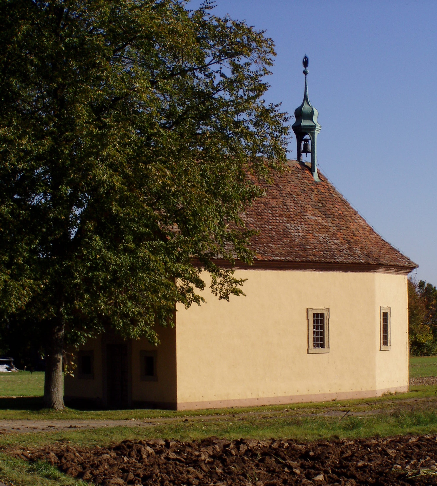 Feldkapelle Zur schmerzhaften Mutter Gottes bei Willanzheim/Unterfranken